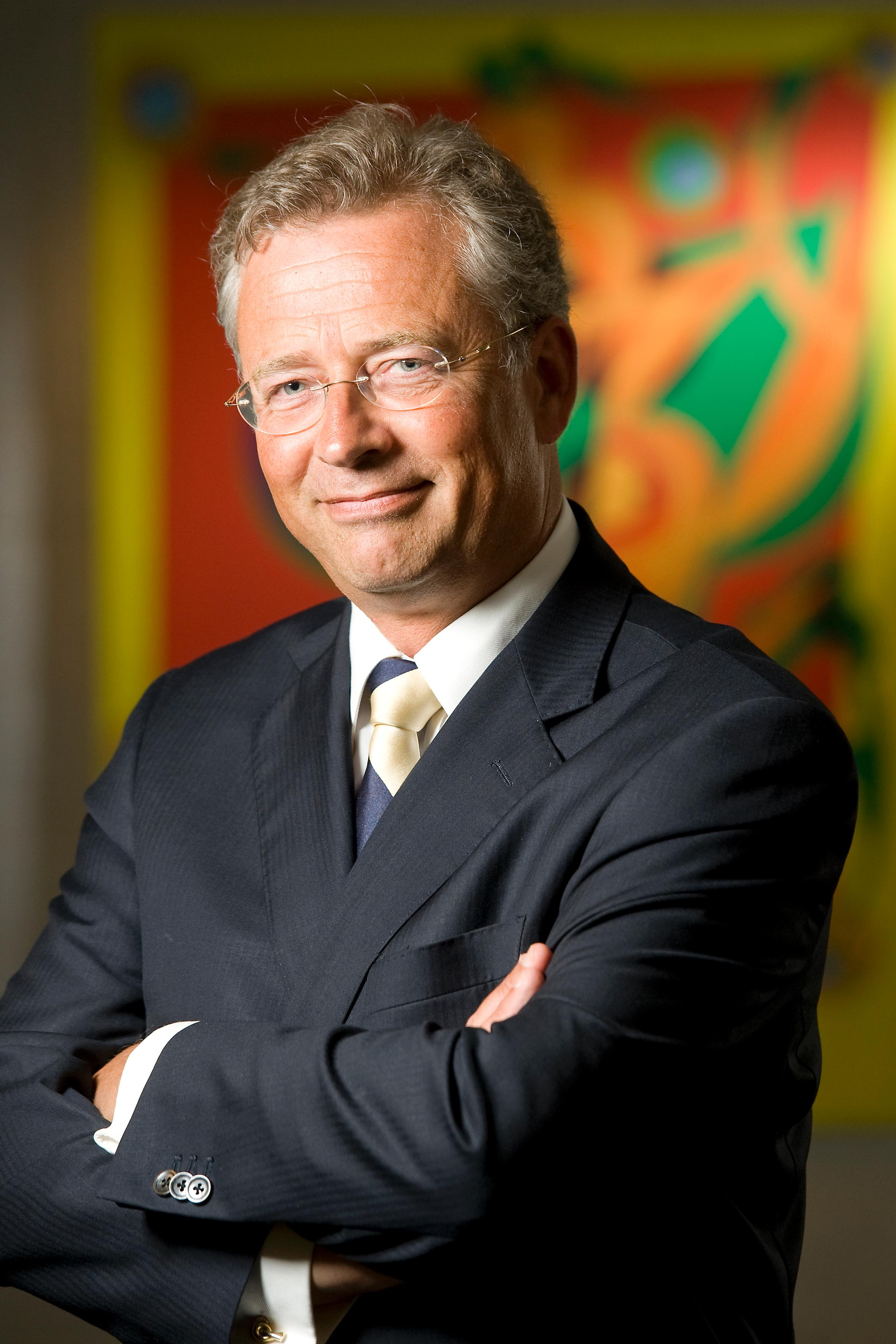 Staatssecretaris van Sociale Zaken en Werkgelegenheid Paul de Krom